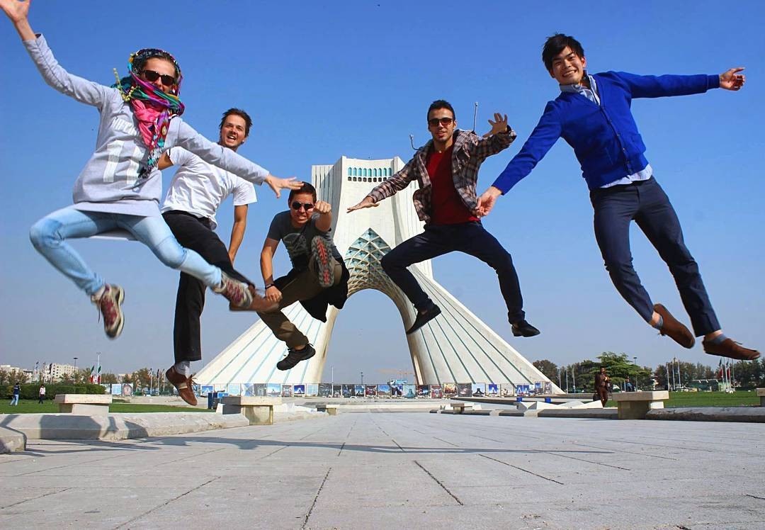 عکسی در حال پرش توسط شهروند ایرانی به همراه شهروندان اروپایی و ژاپنی در روز جهانی صلح